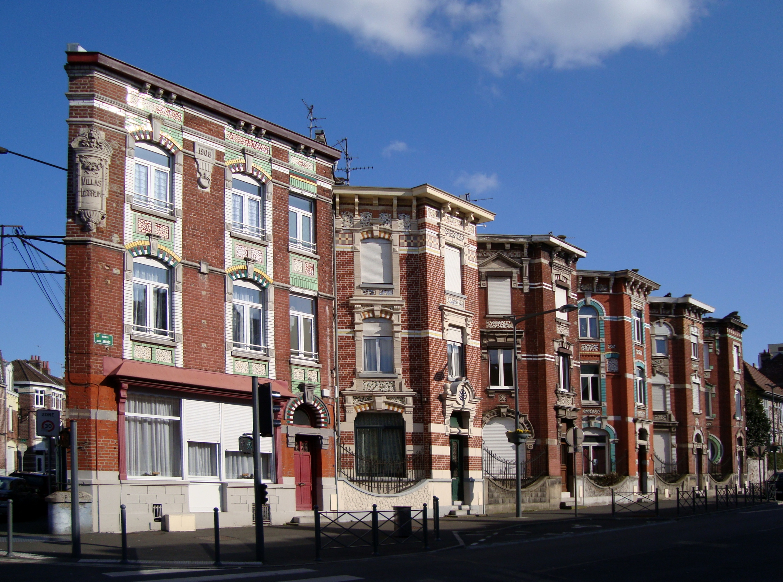 Les villas Lebrun à Ronchin (Nord). Toutes différentes et placée en épi sur rue, elles sont parfois surnommées «les maisons du fou».